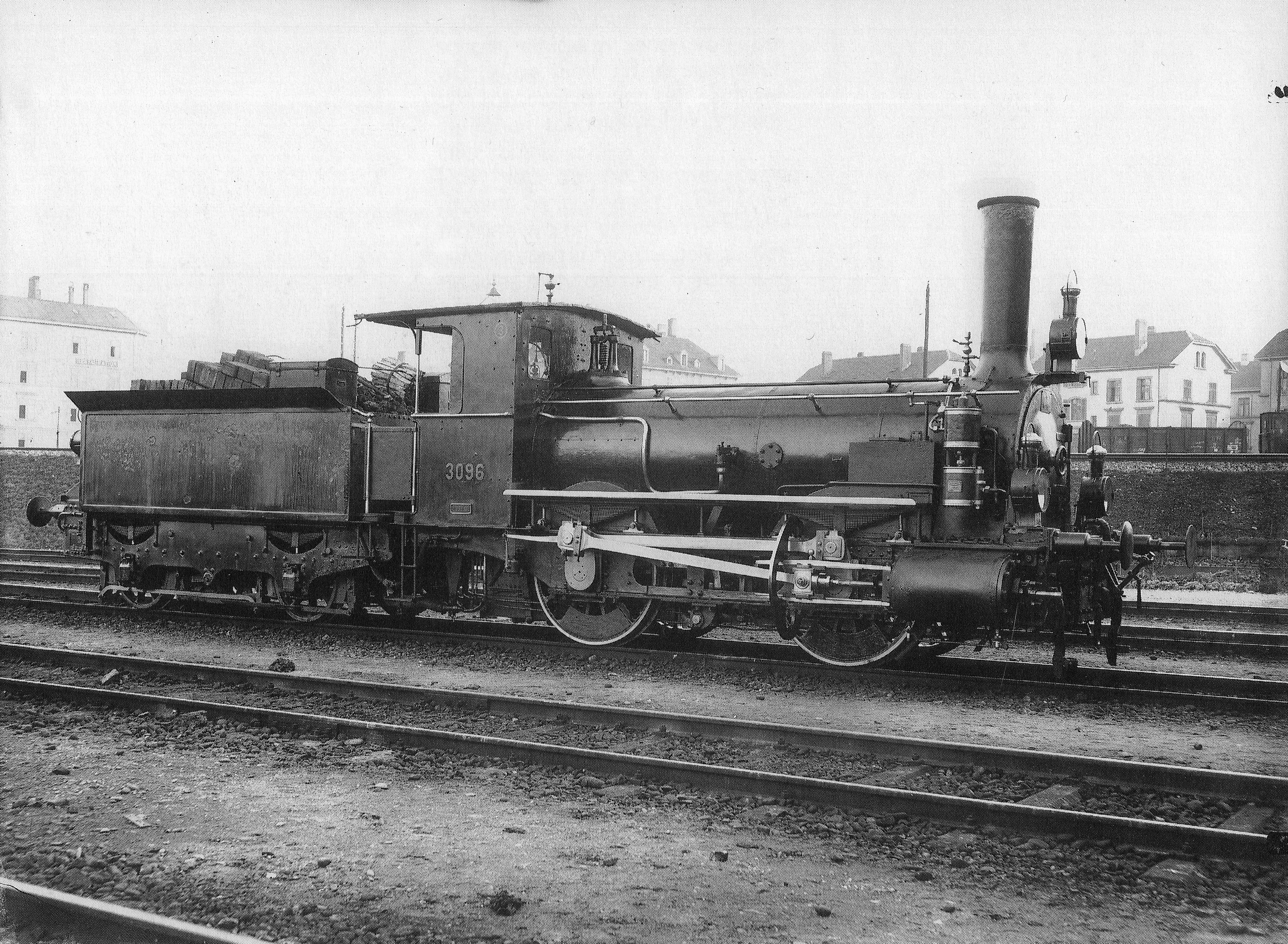 Güterzug-Locomotive Nr. 3096 des Typs D 2/2 der Schweizeriſchen Bundesbahnen, urſprünglich Nr. 42 Altorf der Schweizeriſchen Nordoſtbahn, gebaut 1864 inn der Locomotiv-Fabrique J. A. Maffei zů München (Fabr.-Nr. 476), 1877 umgebaut und mit neuem Keſſel ausgeſtattet, 1905 außer Dienſt geſtellt und anſchließend abgebrochen; aufgnommen um 1903 im Fahrzeug-Dépôt F zů Zürich.